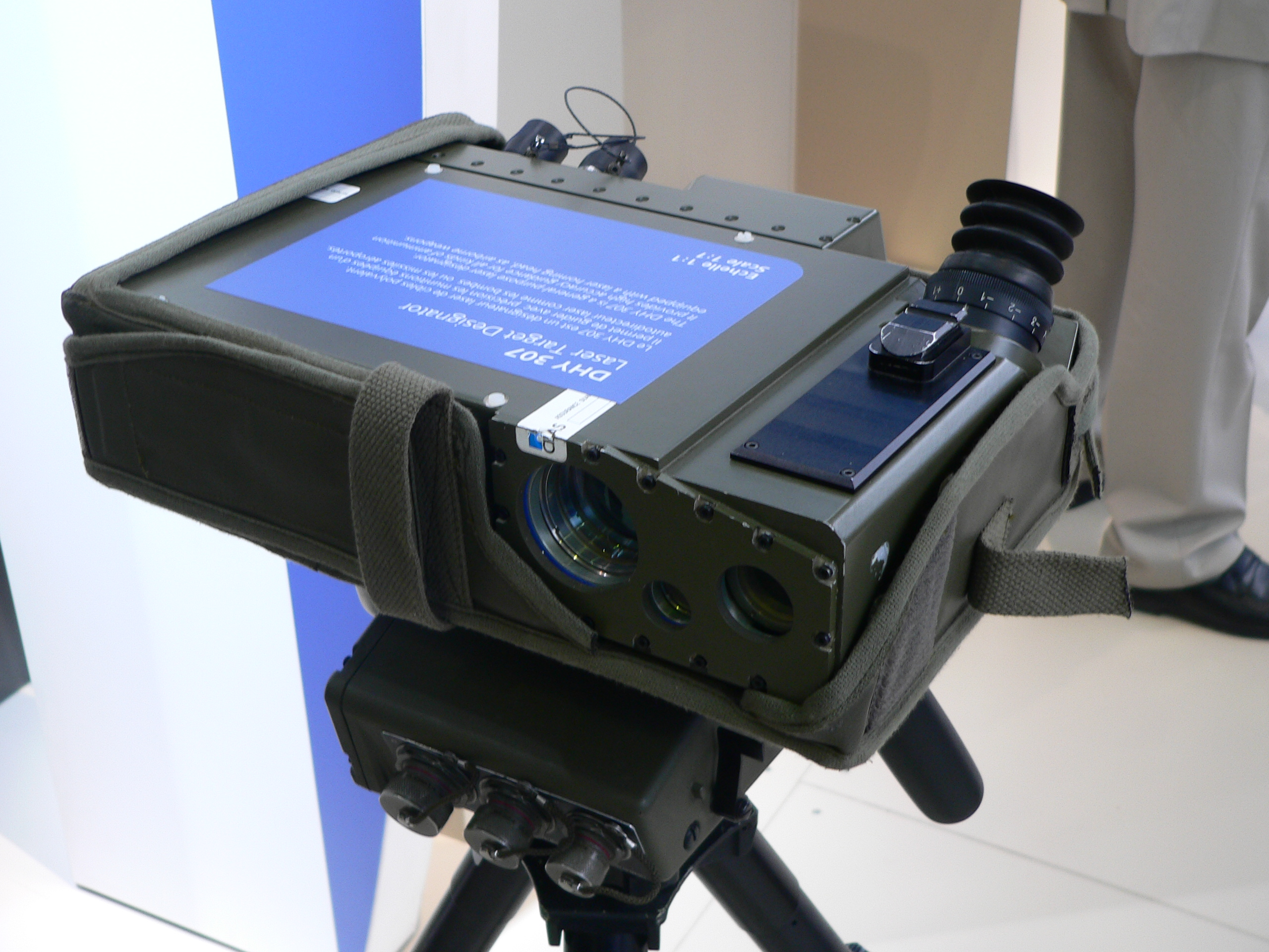 DHY 307 laser target designator